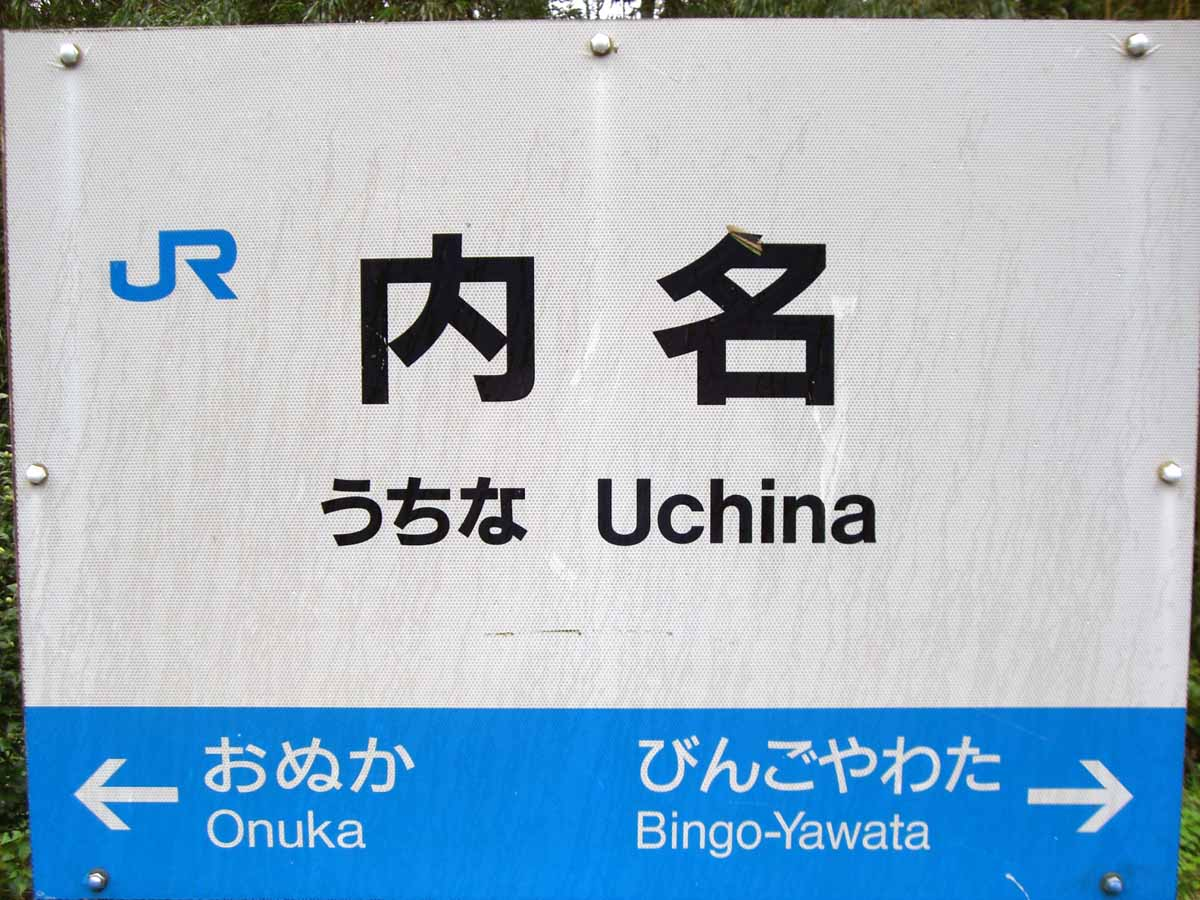 撮影地、撮影場所…JR芸備線、内名駅の待合室。撮影年月日…2006年9月17日